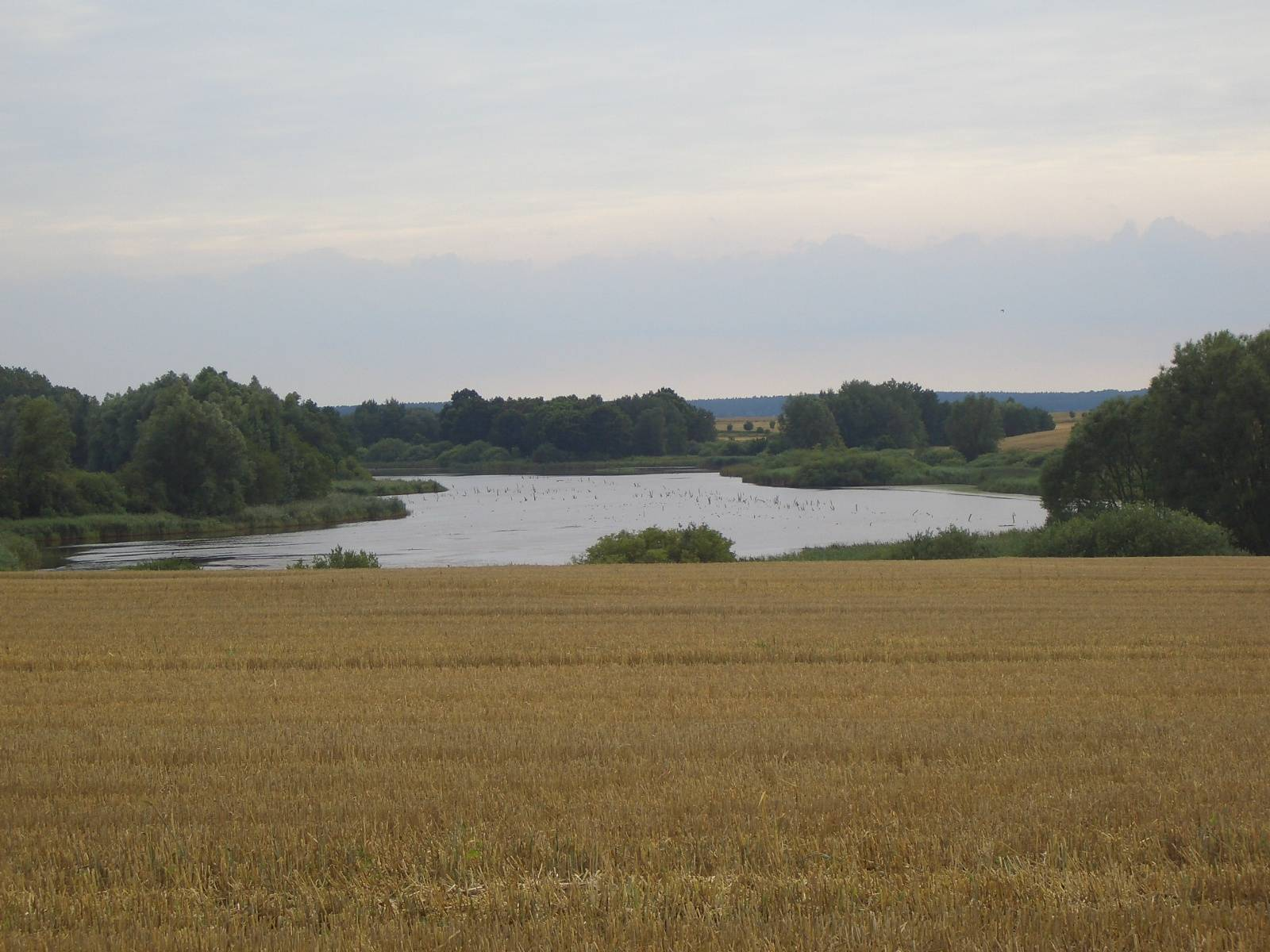 Brooksee, südlich Brookhusen (Mecklenburg-Vorpommern, Deutschland).